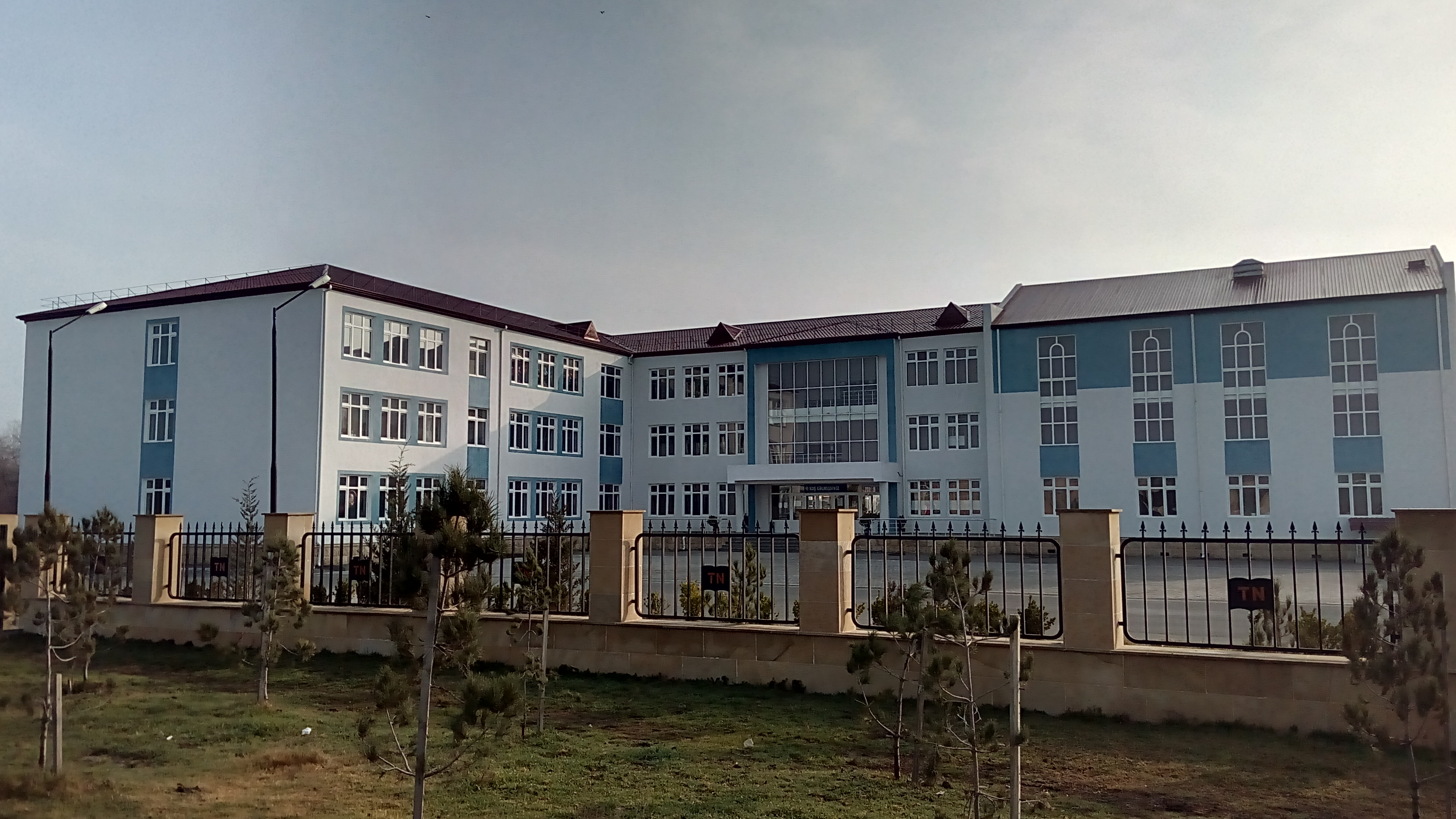 Kürdəmir rayonu M.Əzimov adına Atakişili kənd tam orta məktəbi